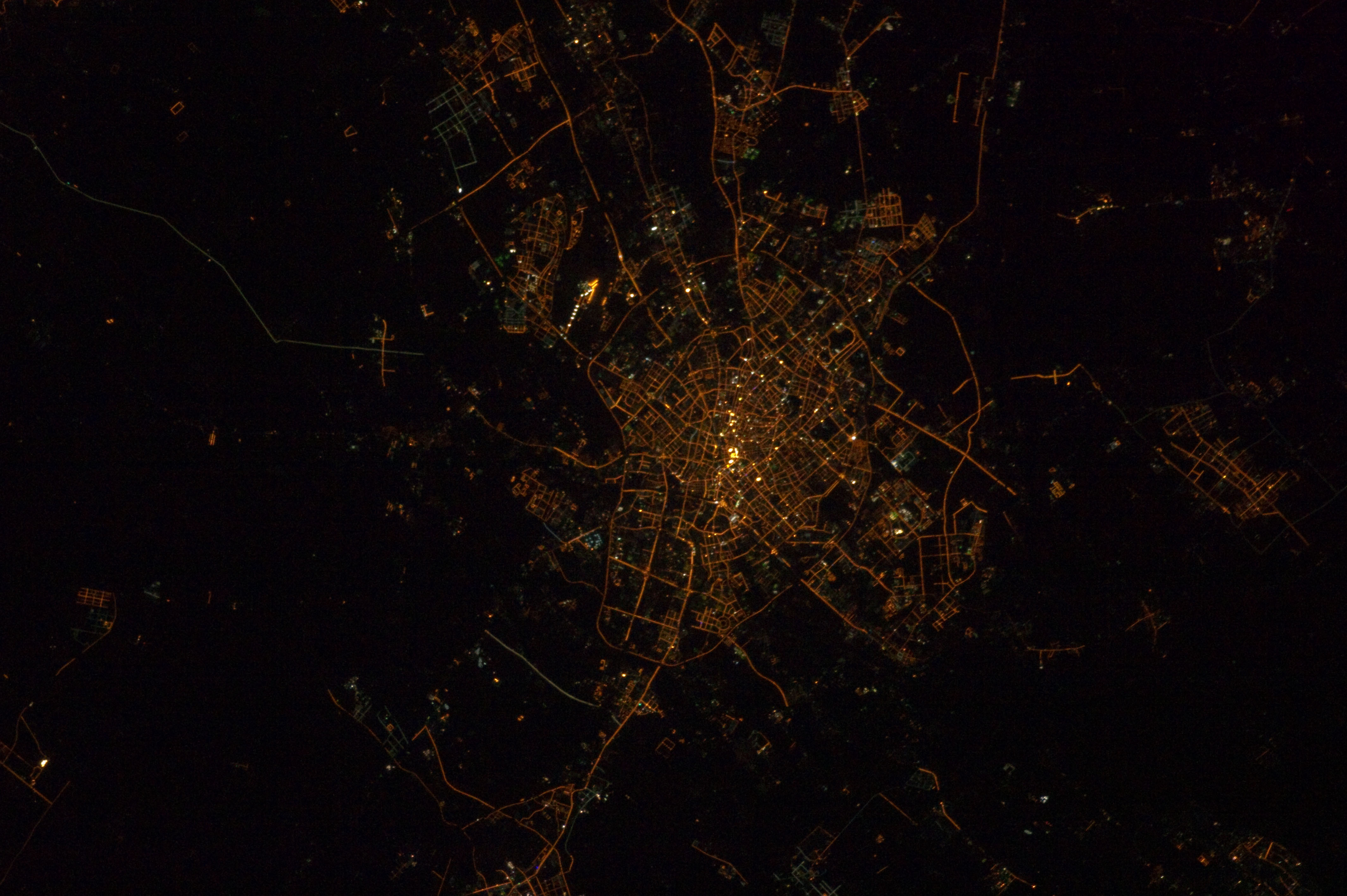 天津中心城区航拍图